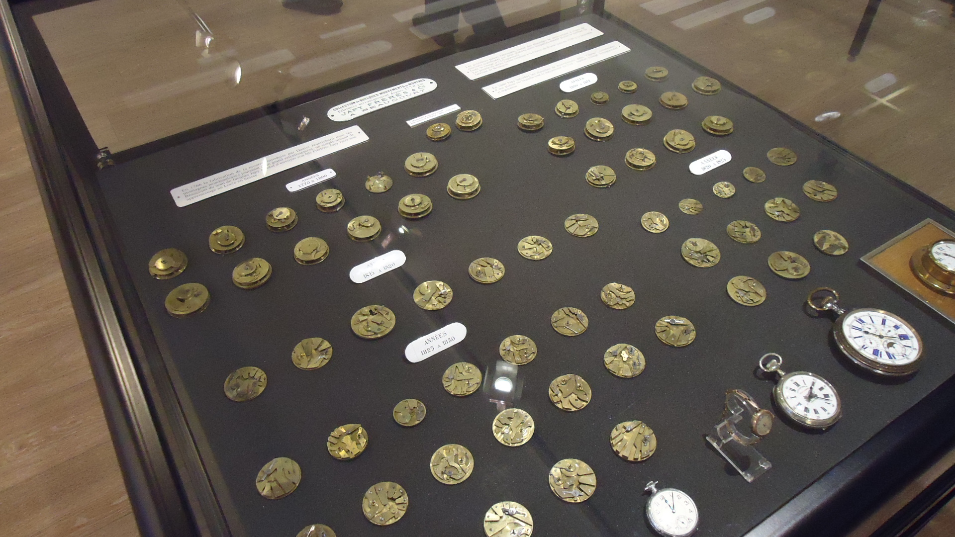 Ébauches de montres datant des années 1800 exposées au Musée Japy